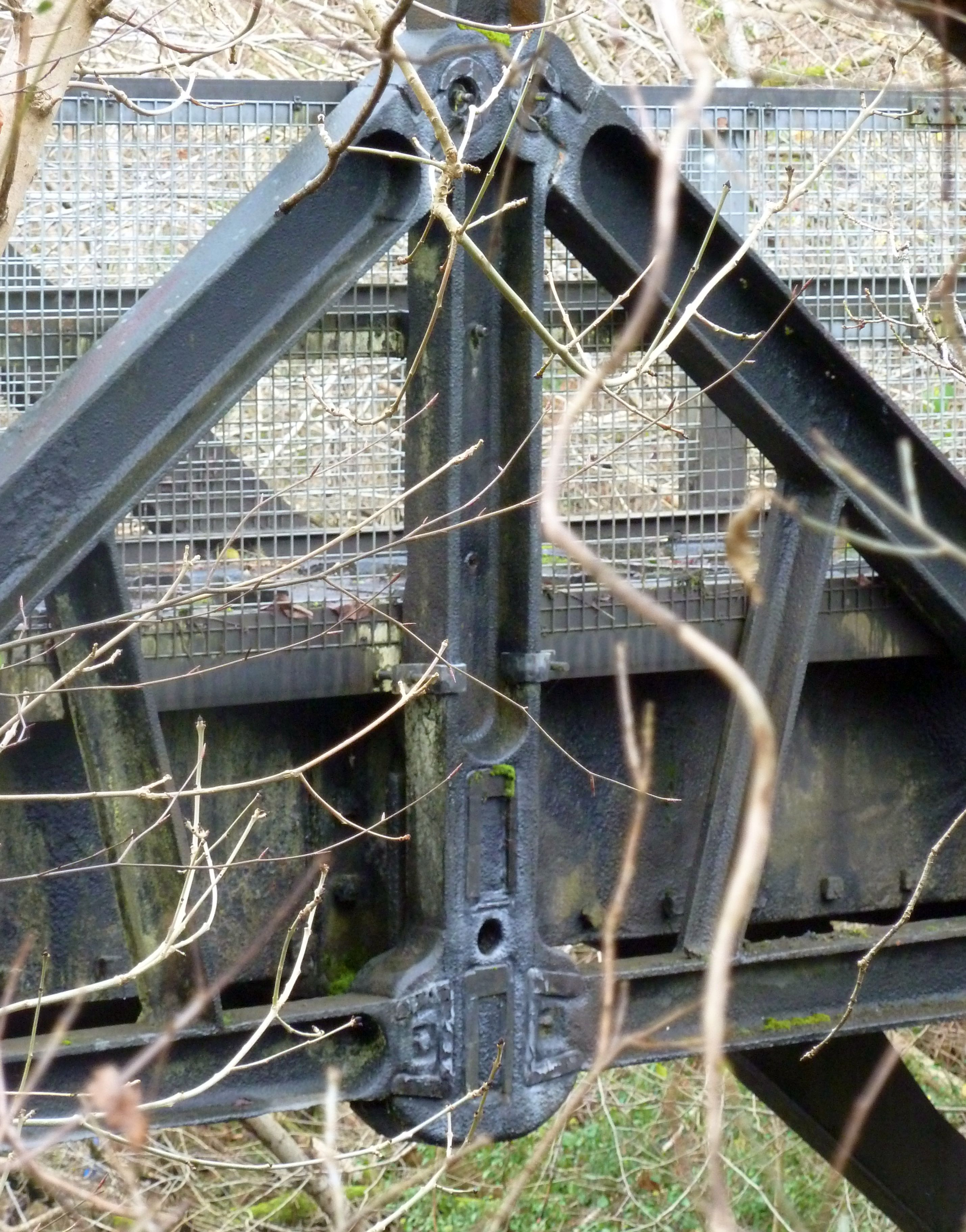 Pont-y-Cafnau